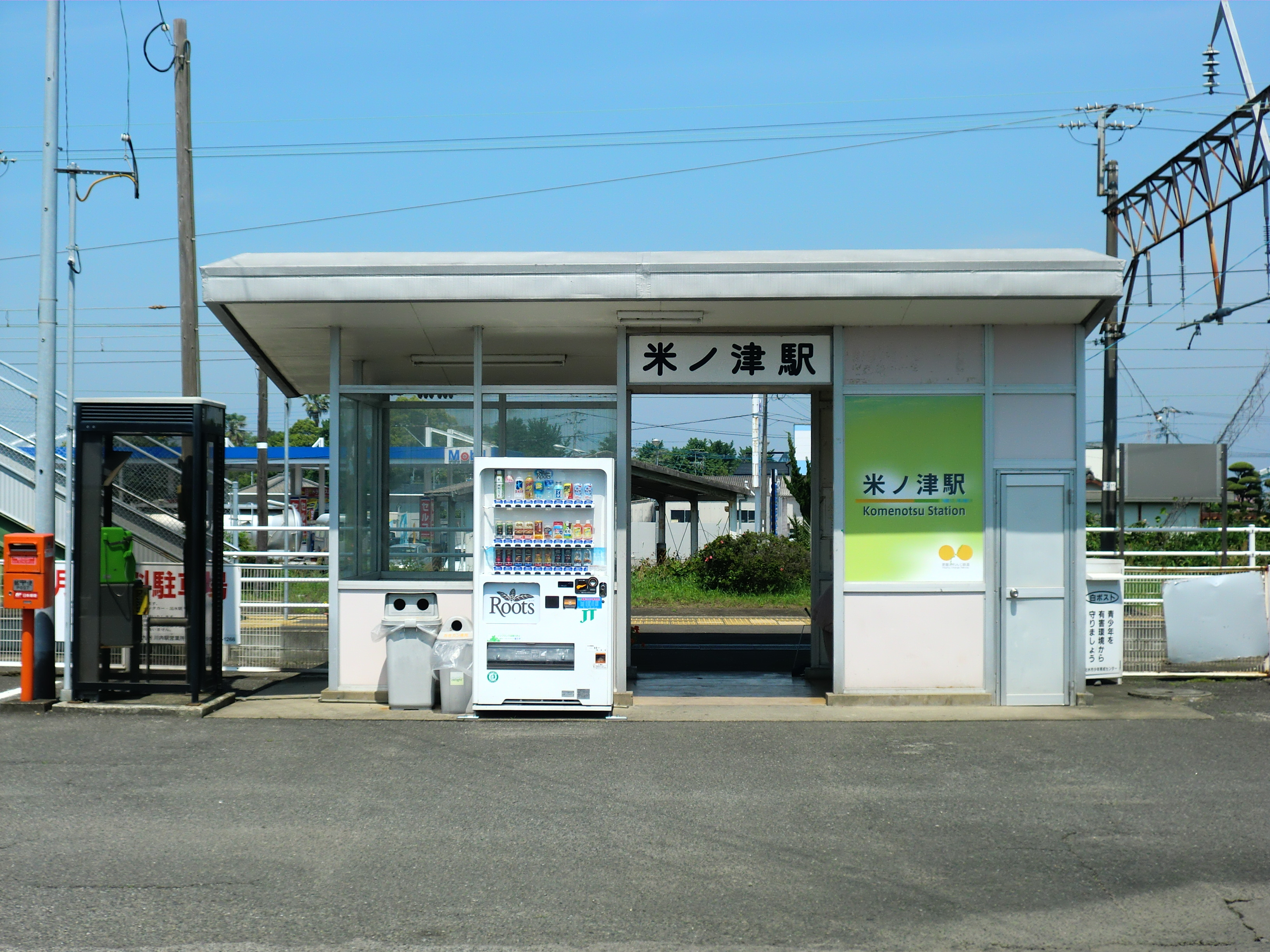 鹿児島県出水市にある肥薩おれんじ鉄道 米ノ津駅